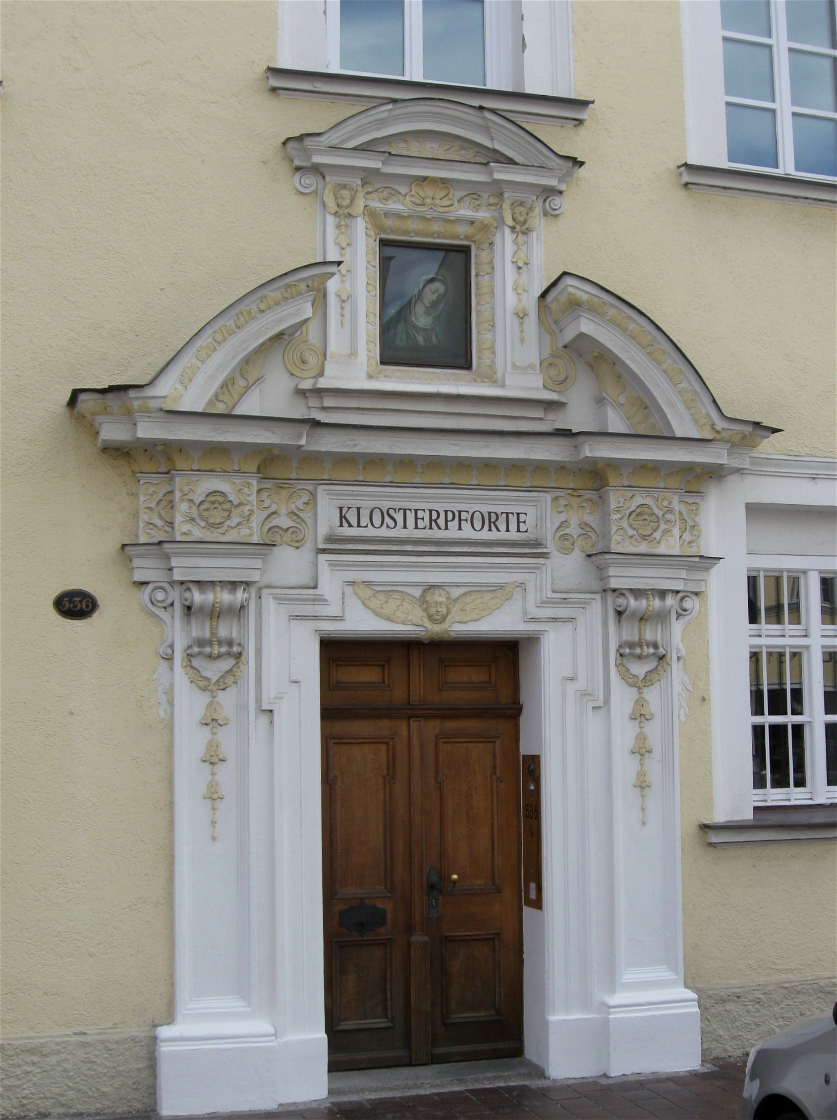 Bischof-Sailer-Platz 537; Neustadt 534; Neustadt 535; Ursulinenkloster; Ursulinenkirche, kleiner Bau mit halbrund geschlossenem Chor, im Langhaus Stichkappentonne, erbaut 1671-1679; mit Ausstattung; Klostergebäude, einfache mehrgeschossige Barockanlage um zwei geschlossene Innenhöfe, zwei Gebäudeflügel erbaut 1671-1686, ein weiterer 1710-1715, Trakt zum Bischof-Sailer-Platz 1884, Aufstockung des Traktes an der Neustadt 1887; mit Ausstattung. D-2-61-000-421 Klosterpforte